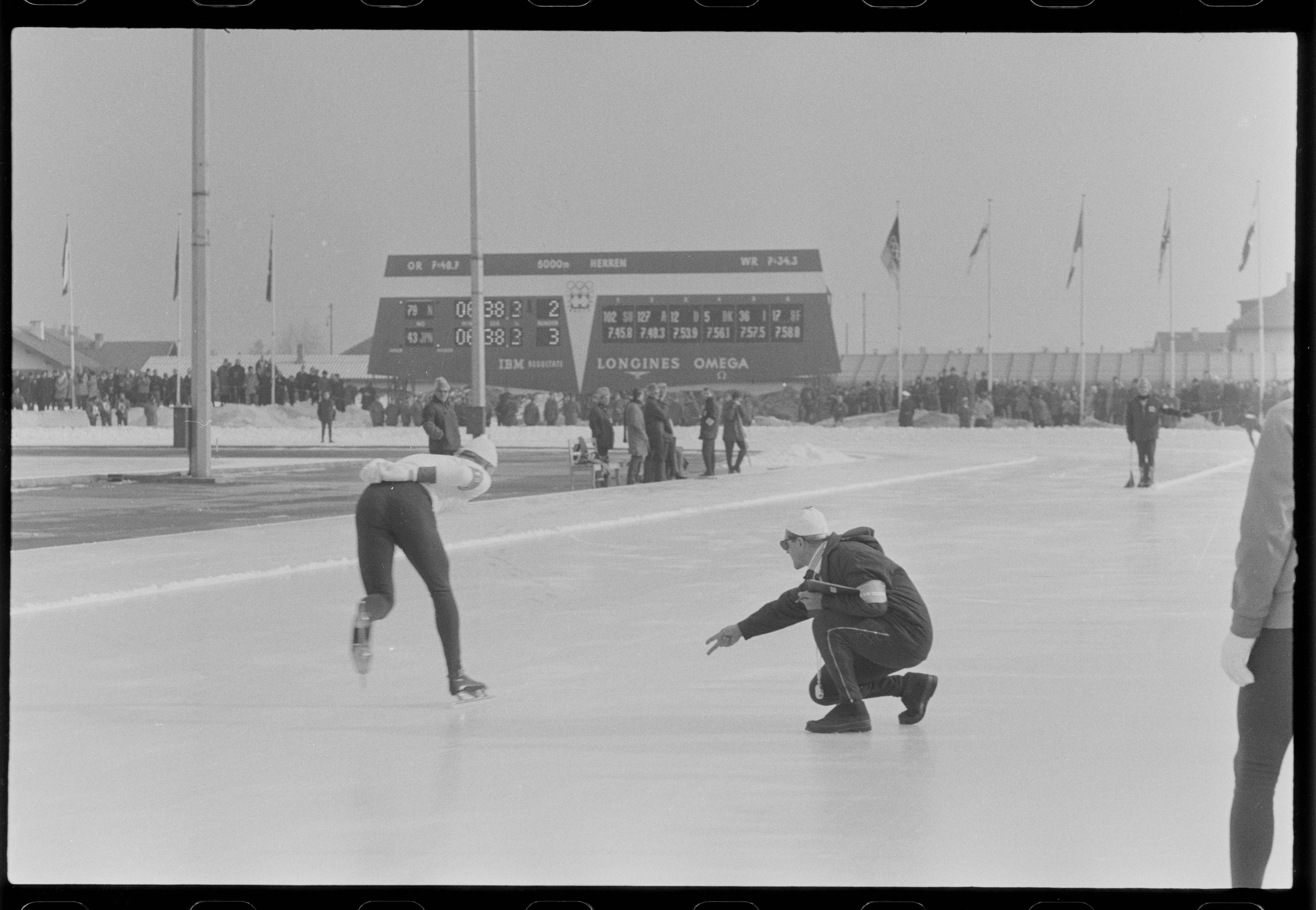 Bildet er hentet fra Arkivverket. OL Innsbruck 1964 500m skøyter Gull Arkivinstitusjon : Riksarkivet Arkivnavn : Billedbladet NÅ Sted : Østerrike, Tirol, Innsbruck, Innsbruck Avbildet